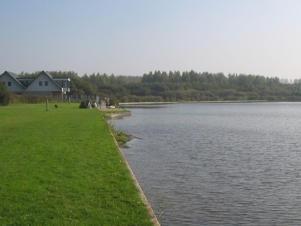 Dobbeplas, Nootdorp, 15 oktober